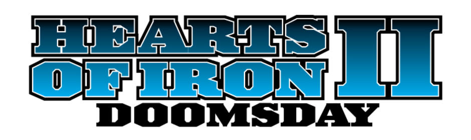 Logo des PC-Spiels Hearts of Iron II: Doomsday